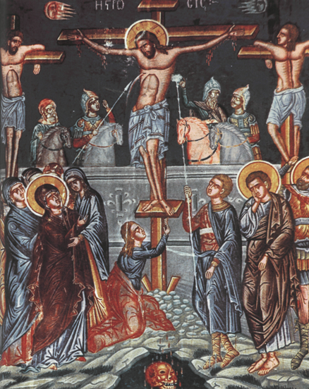 Монастир Святого Варлаама - сцена Розп'яття